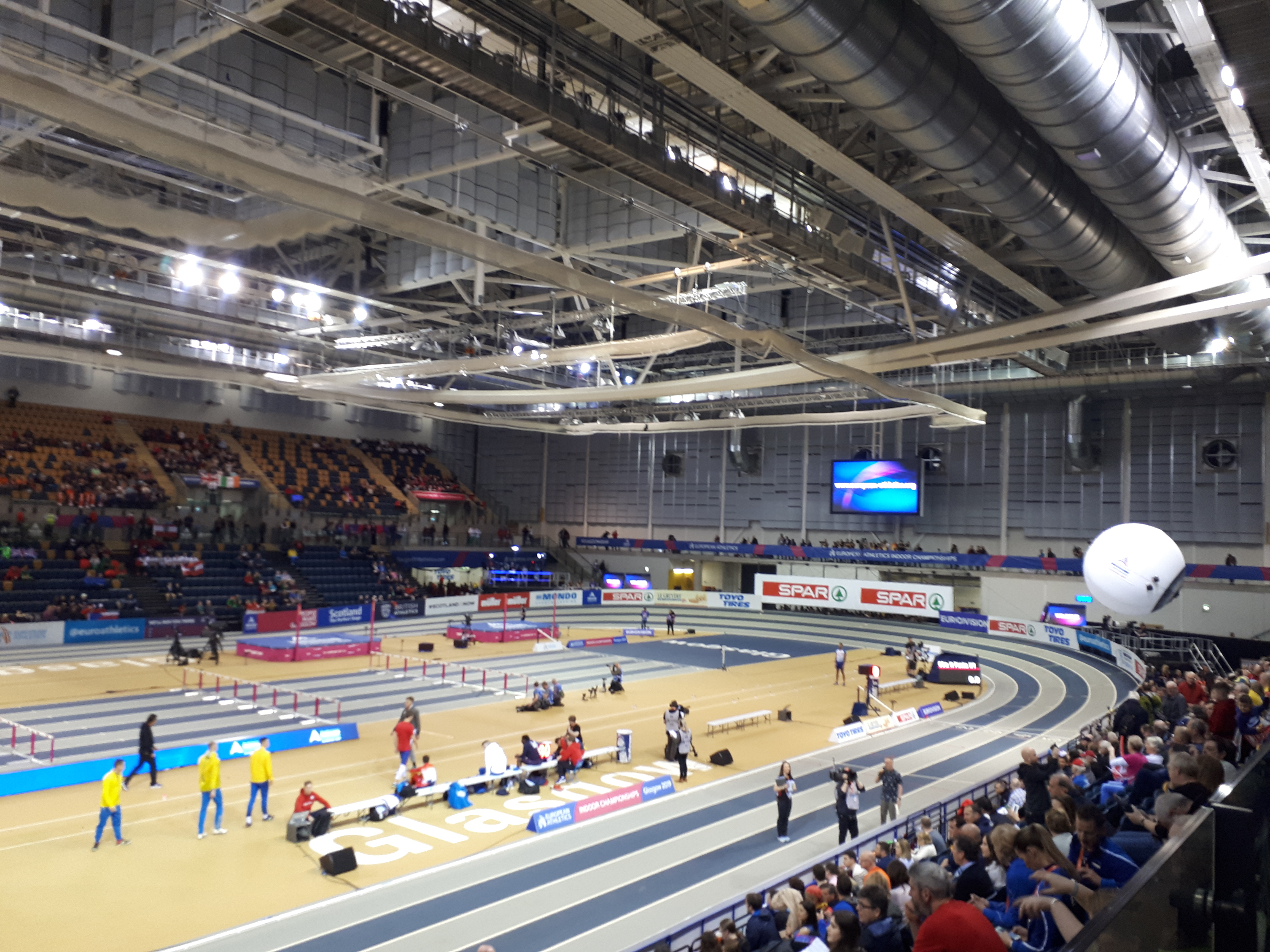 Emirates Arena